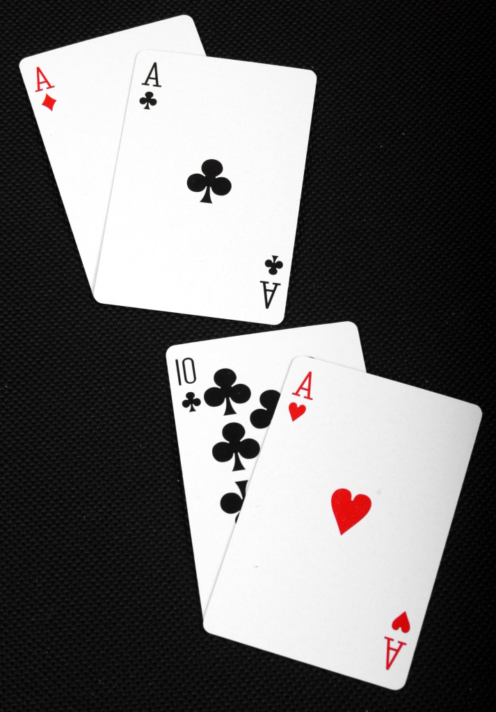 Przykład "perskiego oczka" i "oczka" w grze karcianej "oczko"